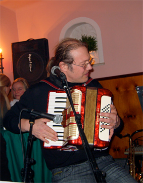 Gert Haussner bei einem Konzert 2008 mit Ziehharmonika